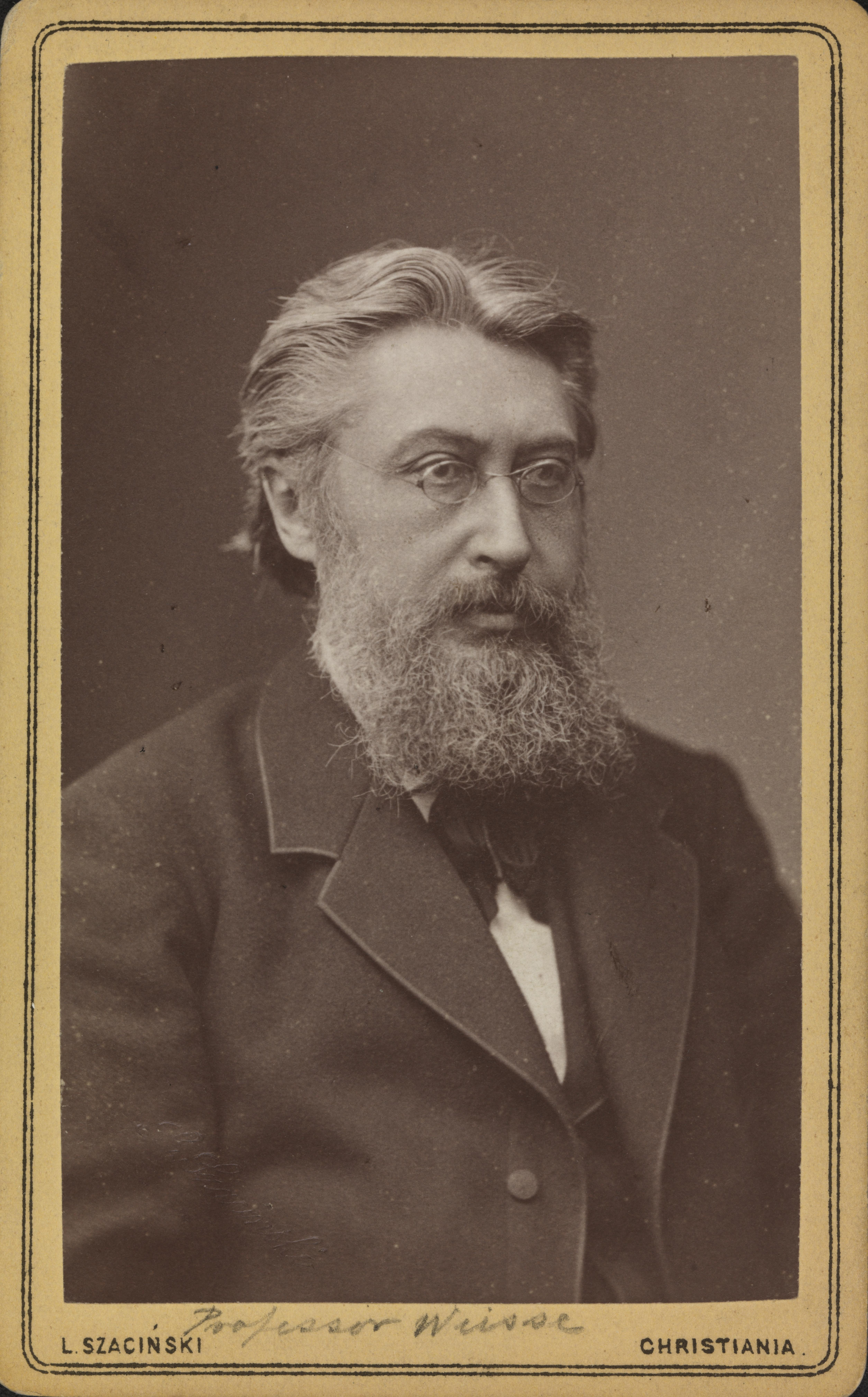 Bildet er hentet fra Nasjonalbibliotekets bildesamling Depicted person: Weisse, Johan Peter